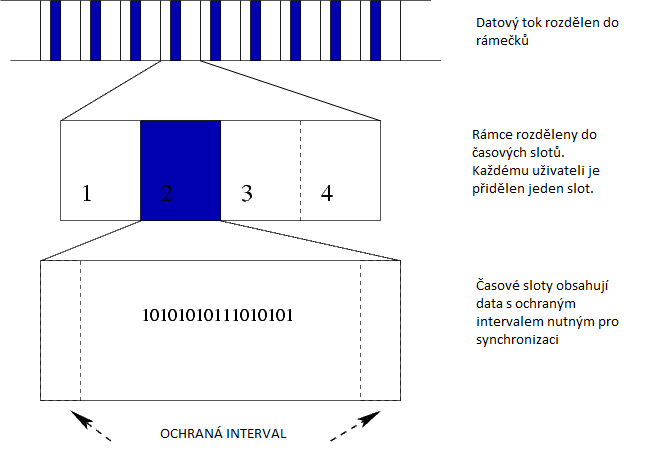 TDMA struktůra